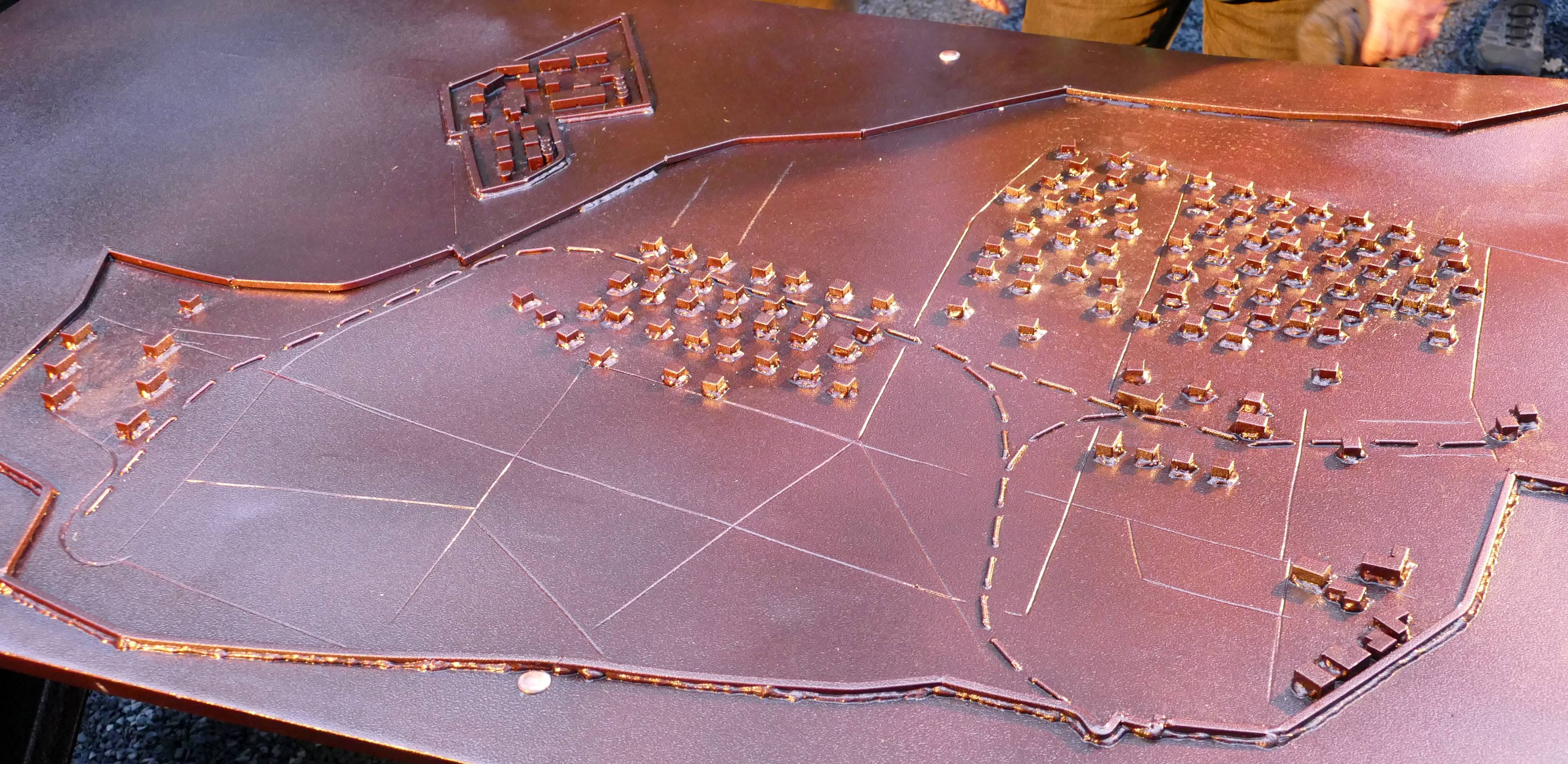 Mahnmal am Eingang zur Muna Lübberstedt, eingeweiht am 9. November 2019